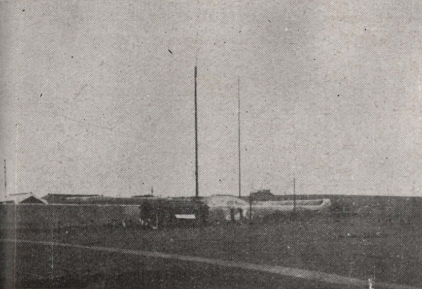 鵝鑾鼻無線電信局位於高雄州恆春郡恆春街，於1937年廢止